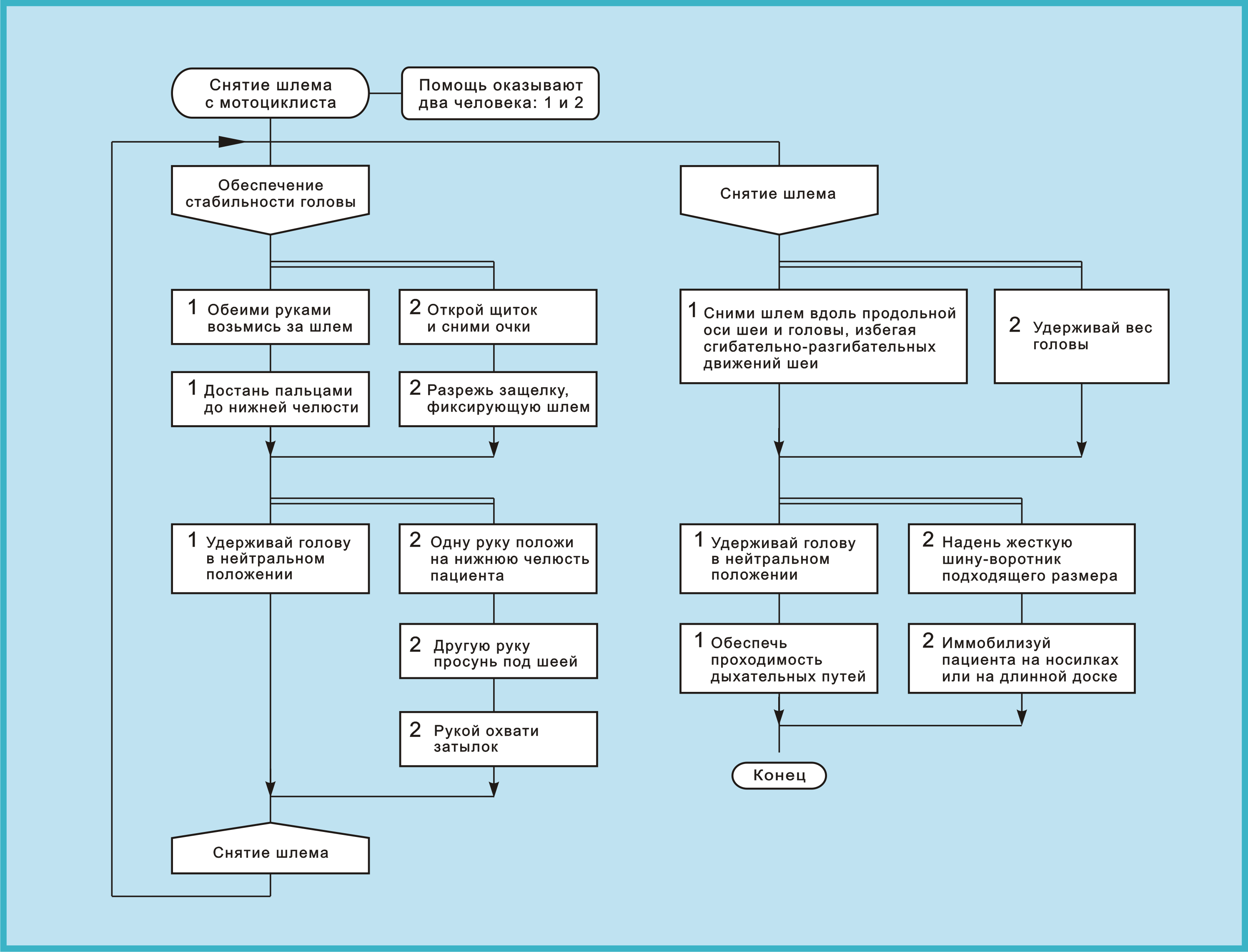 Снятие шлема с мотоциклиста после аварии — медицинский алгоритм на языке ДРАКОН. Алгоритм построен на основе описания, изложенного в книге: "Неотложная медицинская помощь. Материалы курса. — Литва: Центр исследования кризисов, Каунасский медицинский университет, 2012. — 265 с.", в разделе "Иммобилизация позвоночника" на стр. 86-87. Категория:Медицинская информатика Категория:Алгоритмы Категория:Представление знаний Category:Health informatics Category:Algorithms Category:Knowledge representation